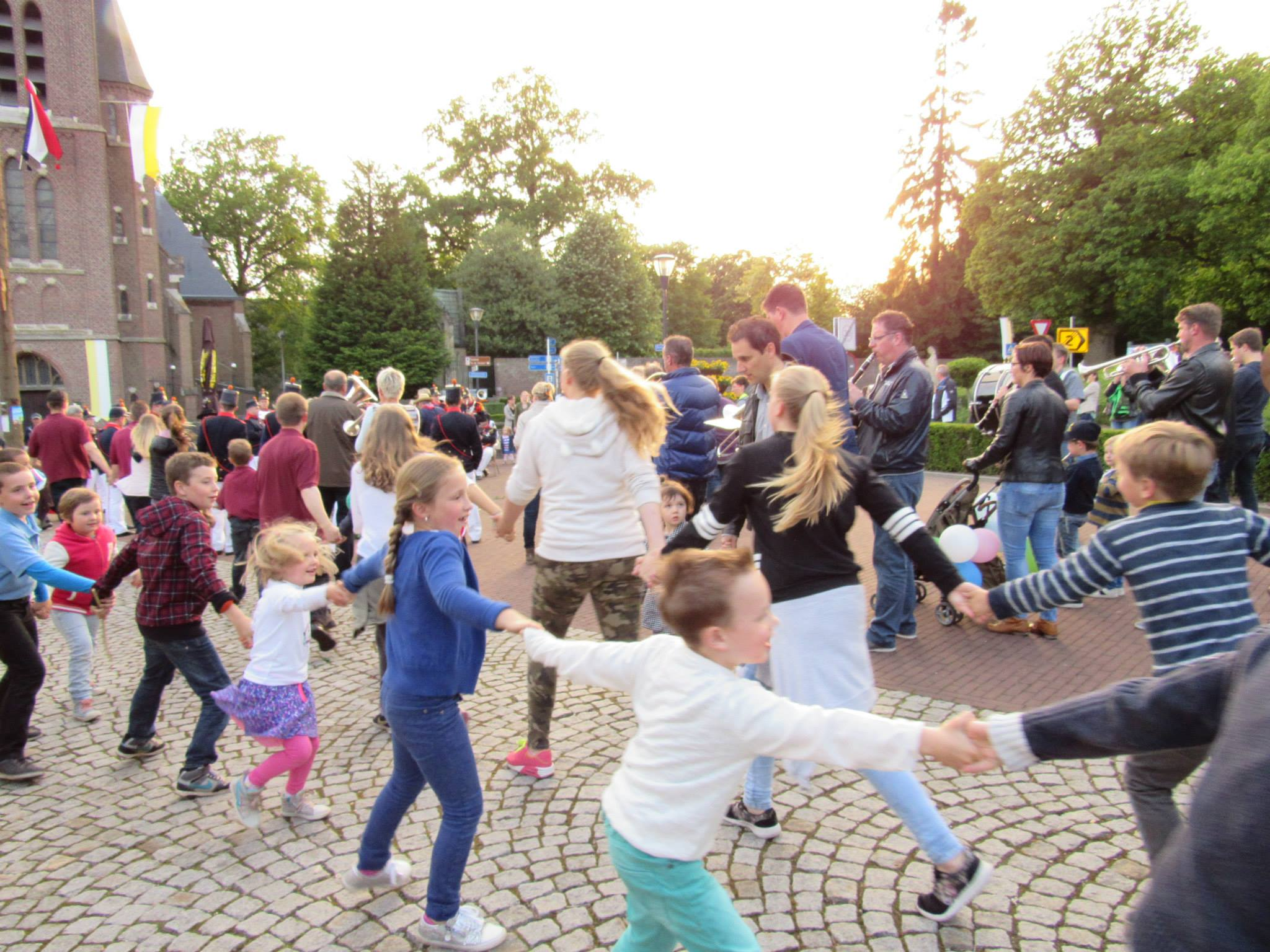 Het dansen van de Cramignon tijdens het traditionele "Päölke Howwe" op kermisdinsdag in Mheer.